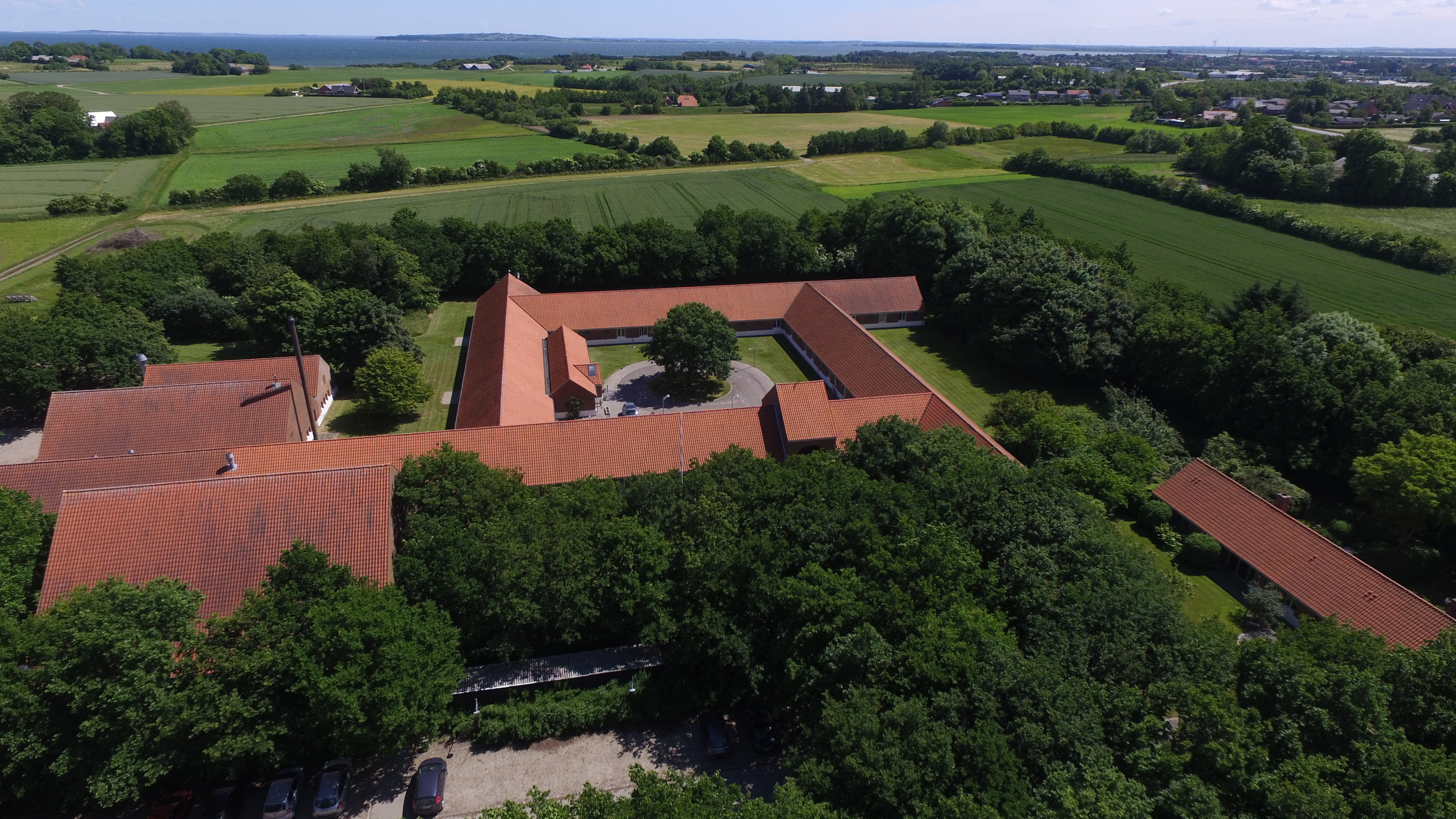 Dronefoto af Morsø Landbrugsskole